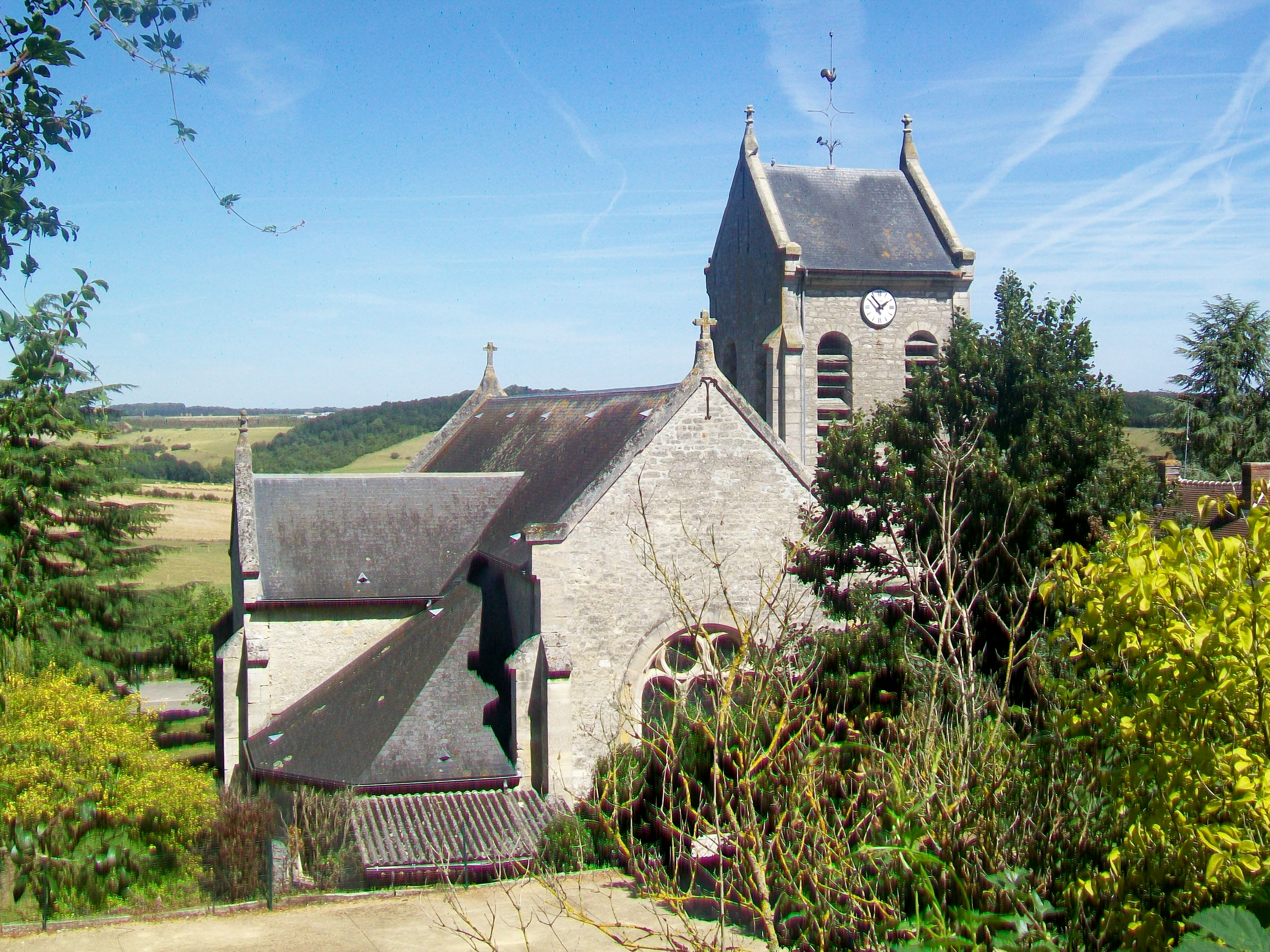 L'église Saint-Saturnin depuis le sud (rue du Trésor). Le chœur est effectivement orientée vers le sud-sud-ouest.